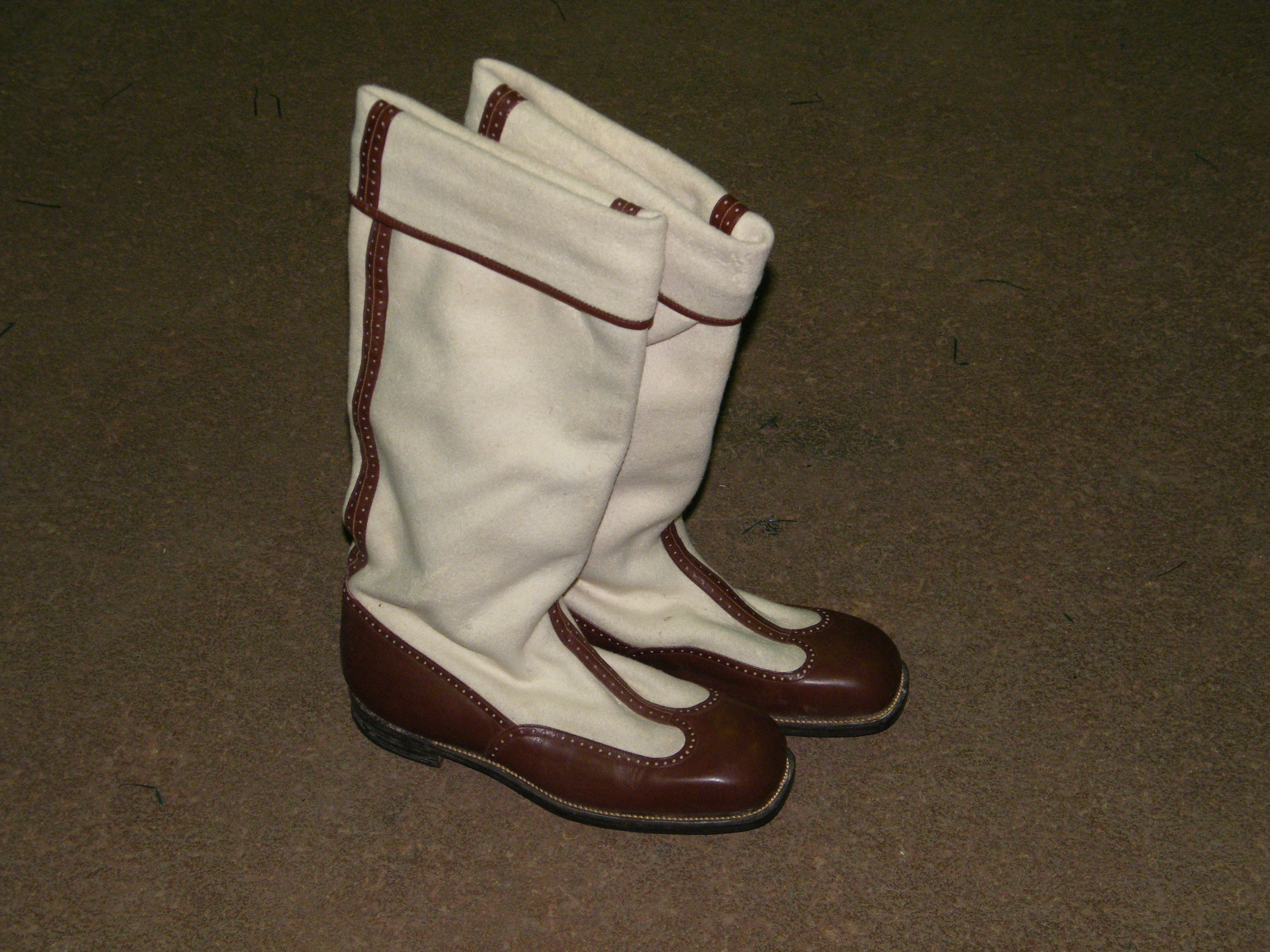 Бурки русская зимняя обувь, 1960-е годы